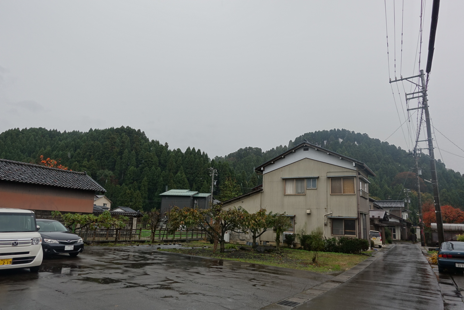 福井県福井市にある槇山